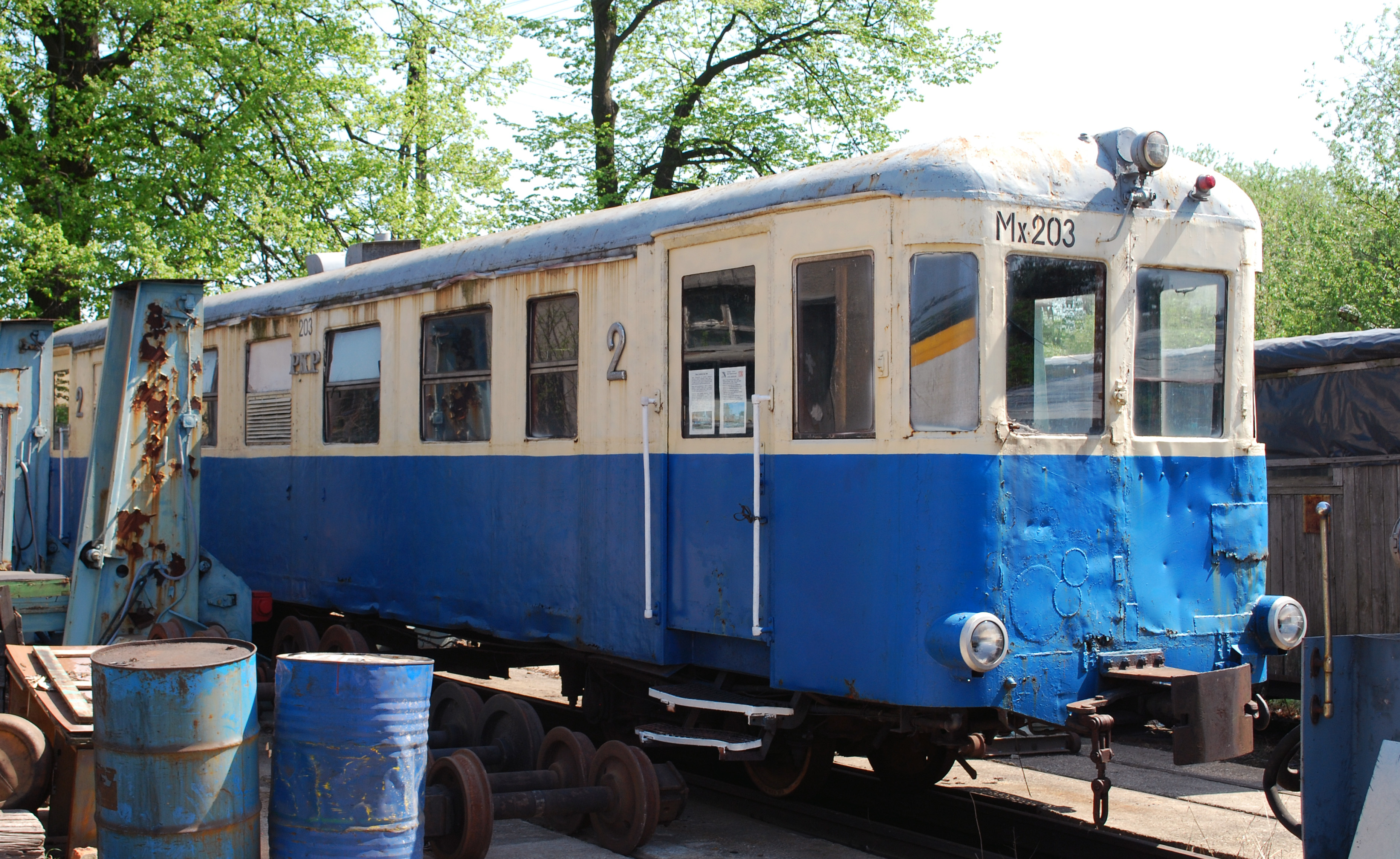 Rogowska Kolej Wąskotorowa Wagon pasażerski Mx203 (dawne oznaczenie: MBxd1-203)